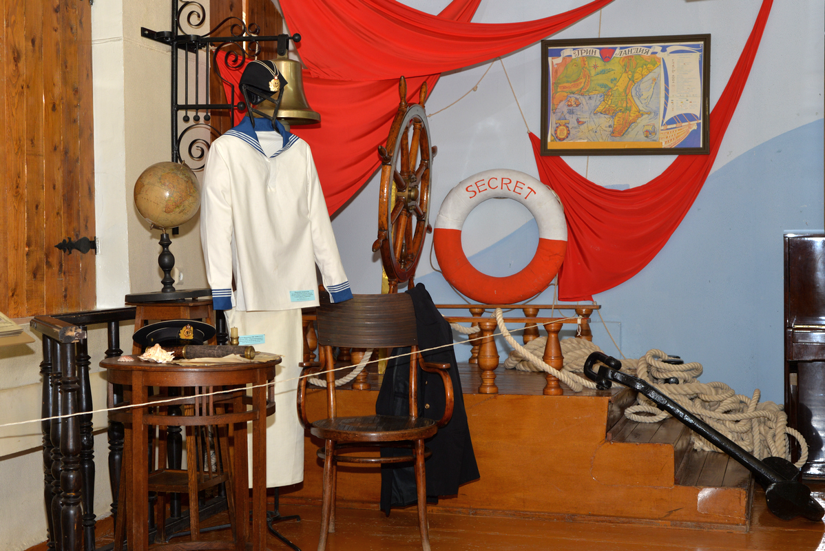 Интерьер музея А. С. Грина, Киров